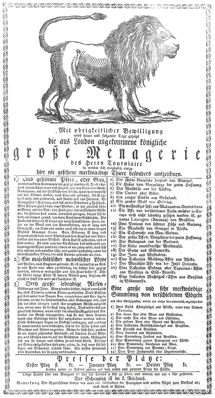 Menagerie Jacques Tourniaire Anschlagzettel, um 1817 Stadtbibliothek Nürnberg